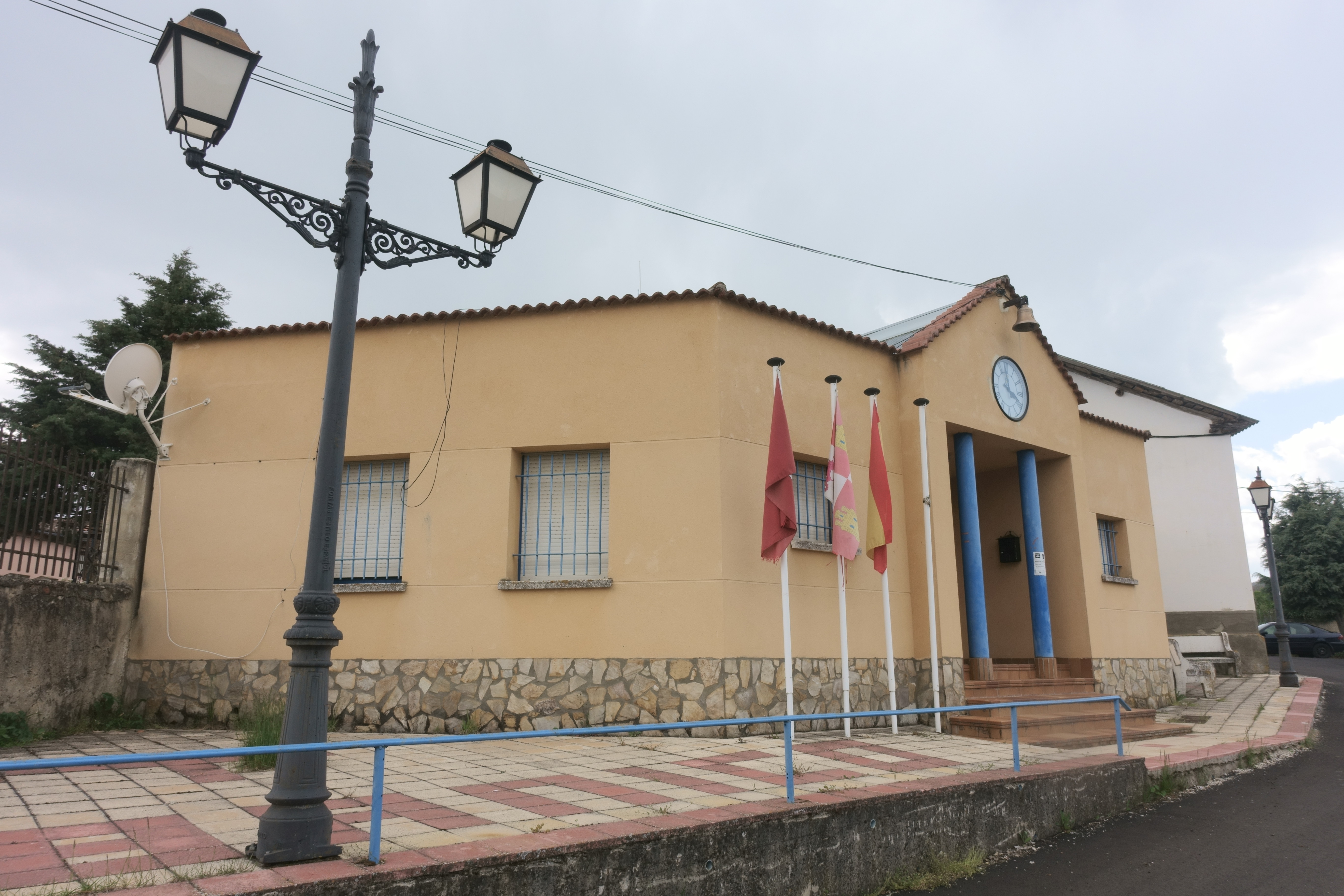 Casa consistorial de Cebanico (León, España).